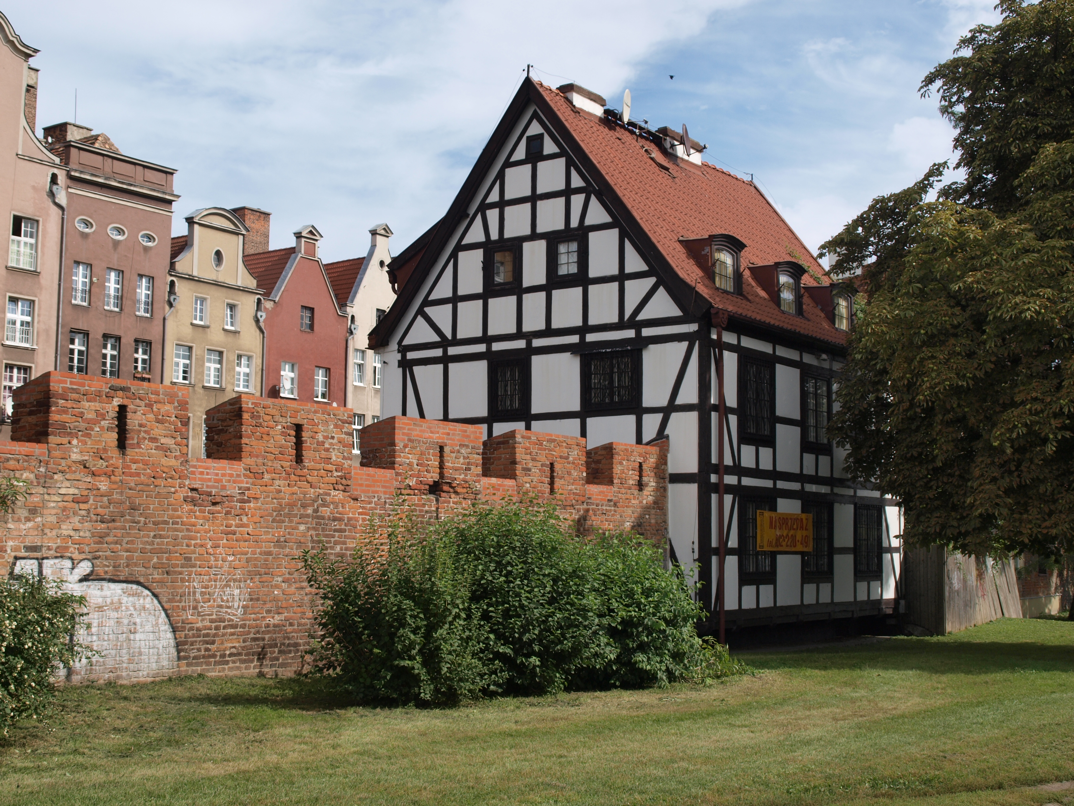 Gdańsk Główne Miasto - zabytkowy dom przy ul. Za Murami 19 (dawniej Zamurnej).